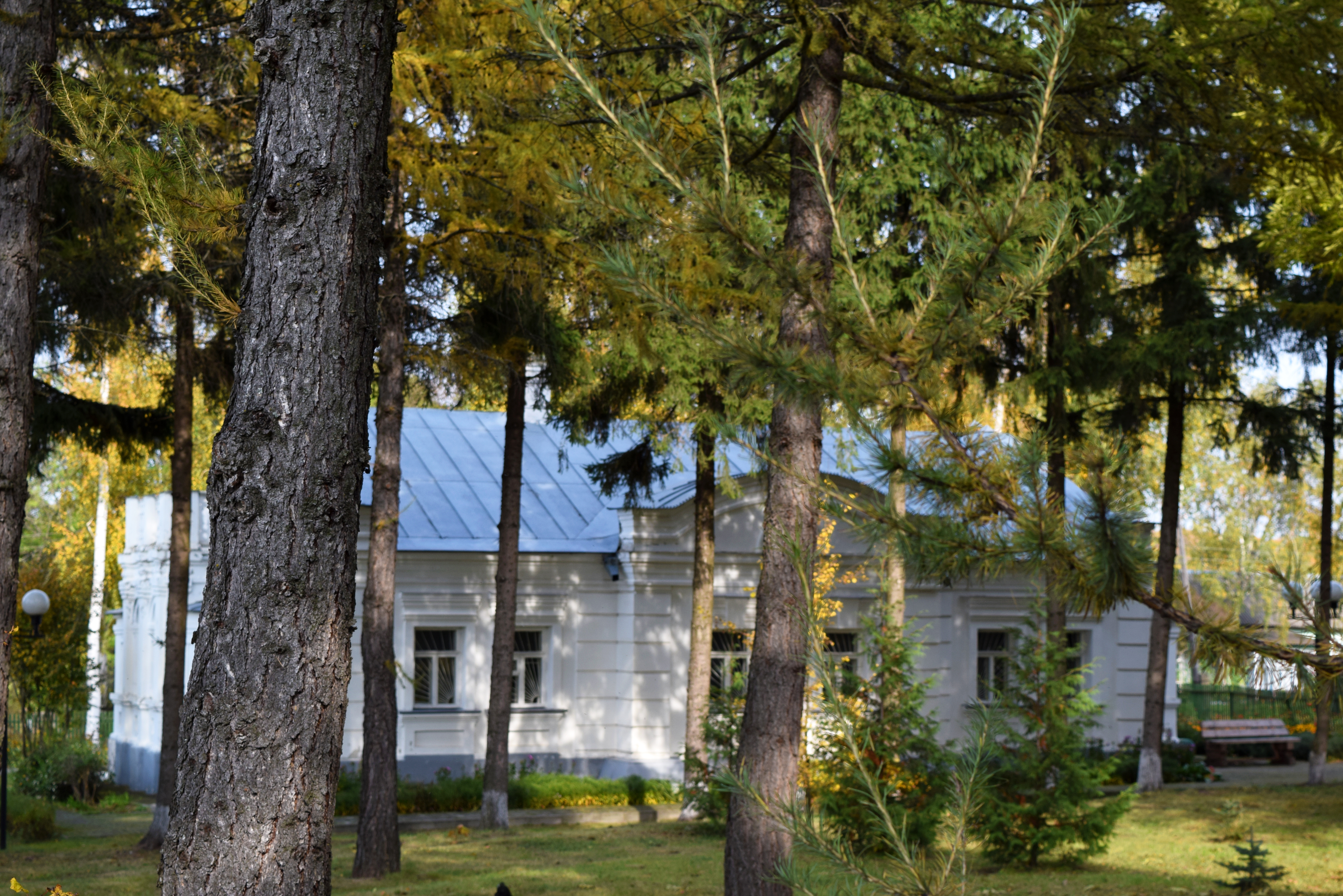 д. Гремячка, Милославский район, Рязанская область